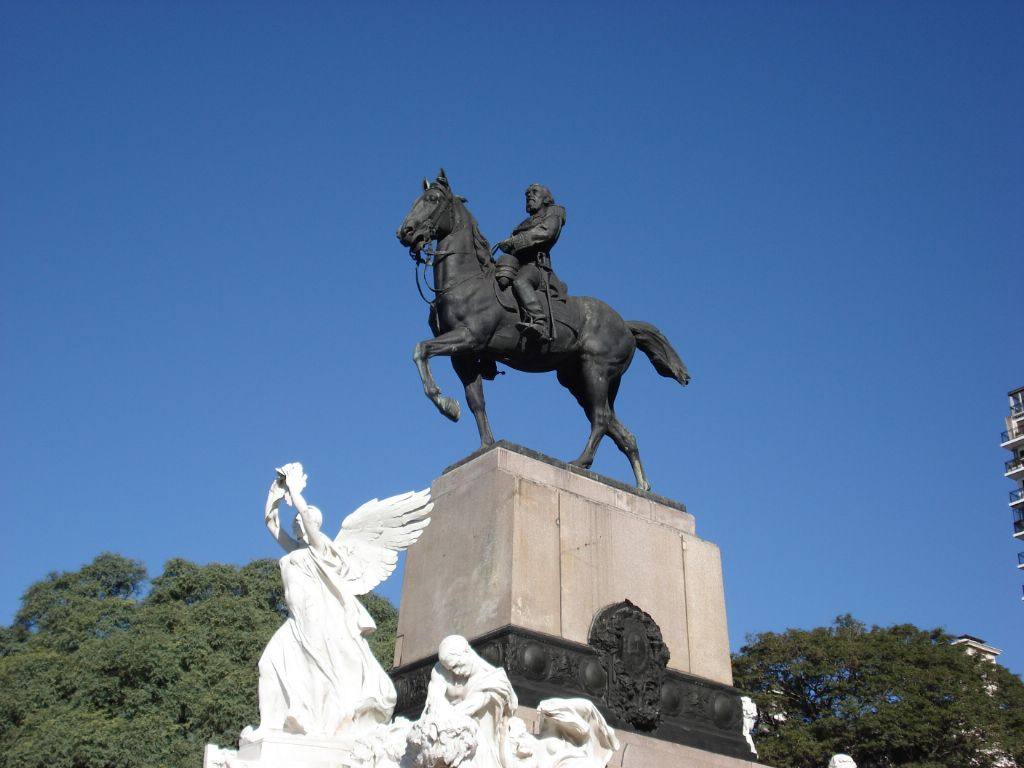 Monumento a Bartolomé Mitre en la Ciudad de Buenos Aires, Argentina. Escultor: Davide Calandra (1856-1915)